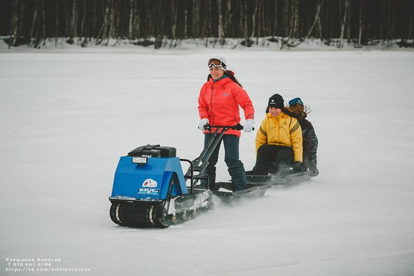 Мотобуксировщик Помор 380 - вес всего 60 кг, малогабаритный, переднеприводный